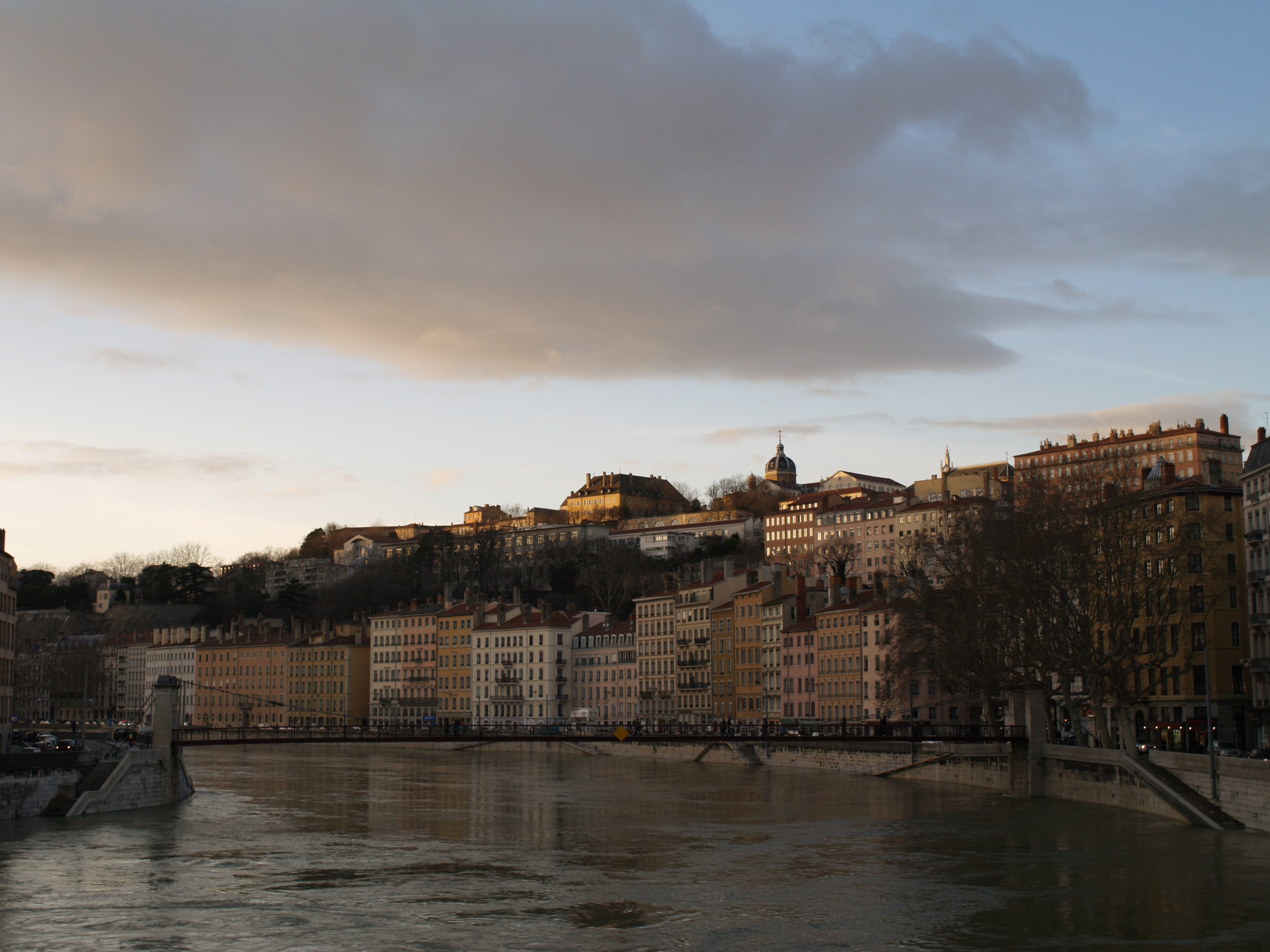 Passerelle Saint-Vincent, Lyon